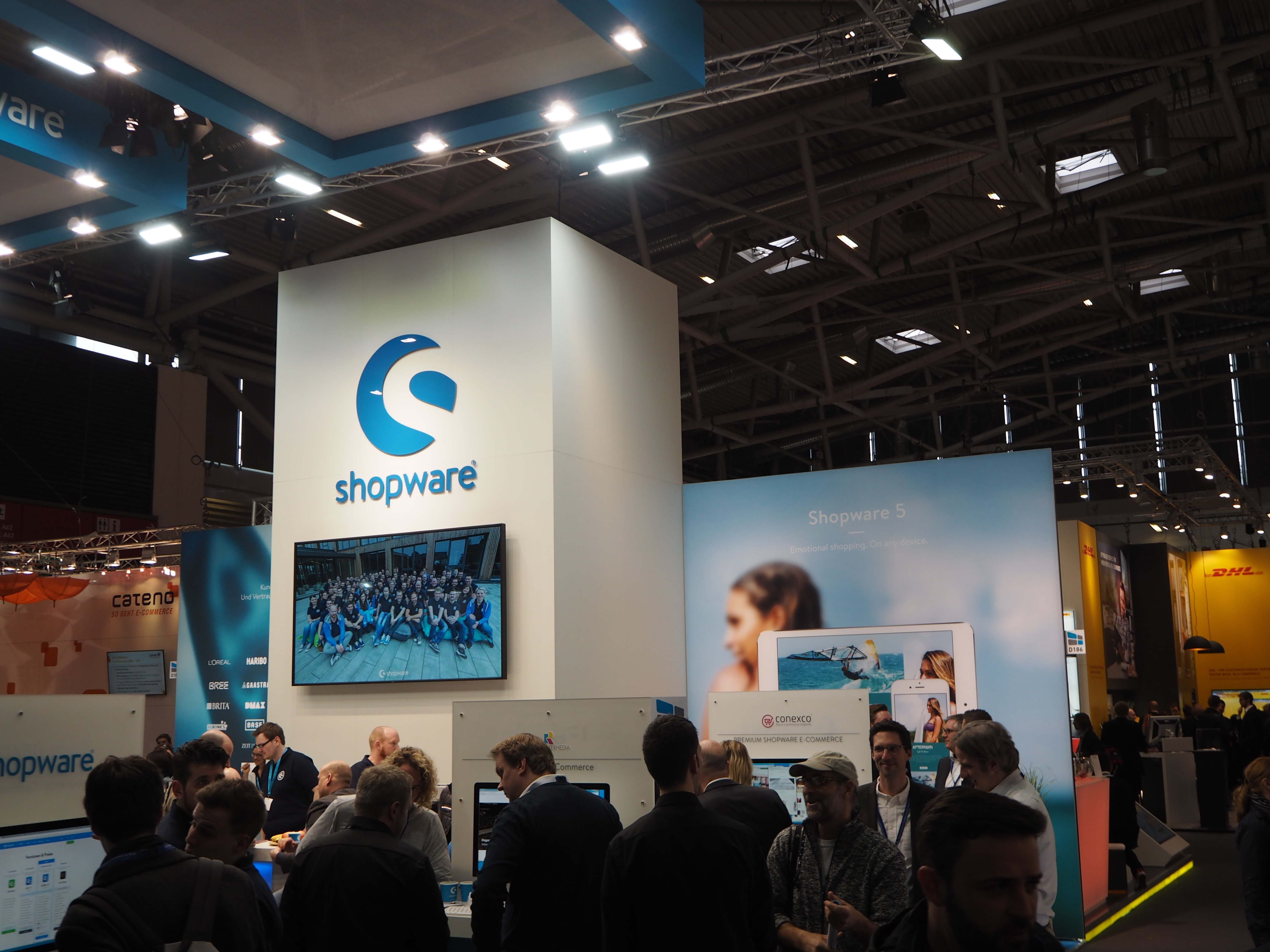 Internet World Fair 2017 in Munich, Germany; Shopware-Stand